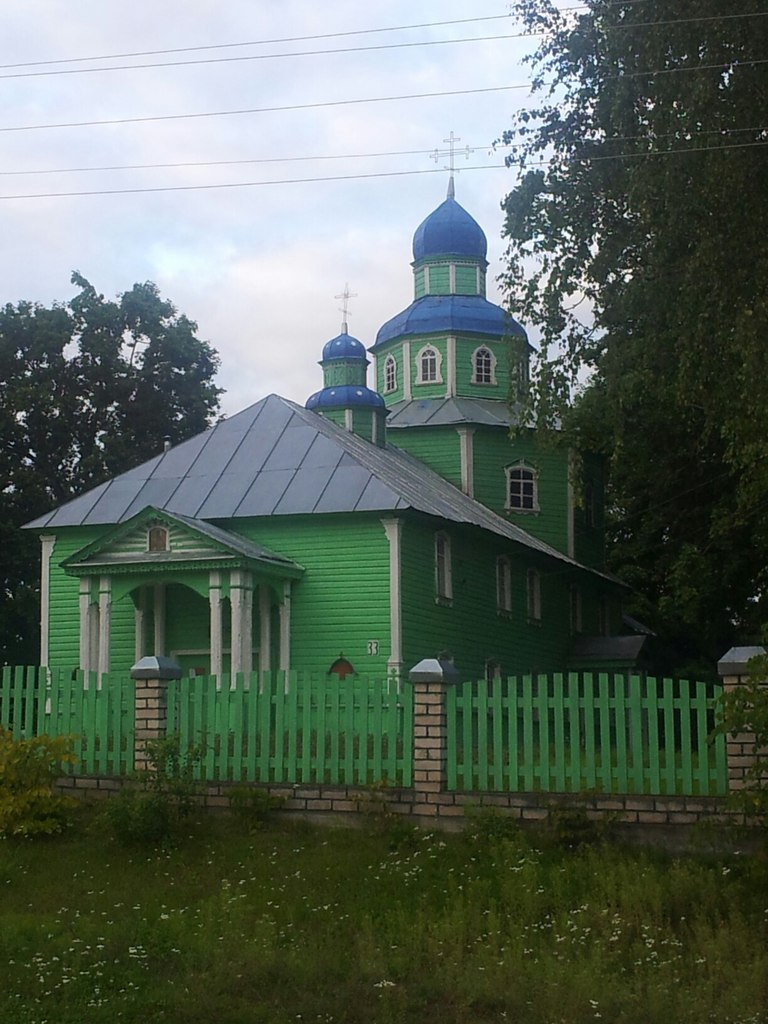 Церковь Никольская